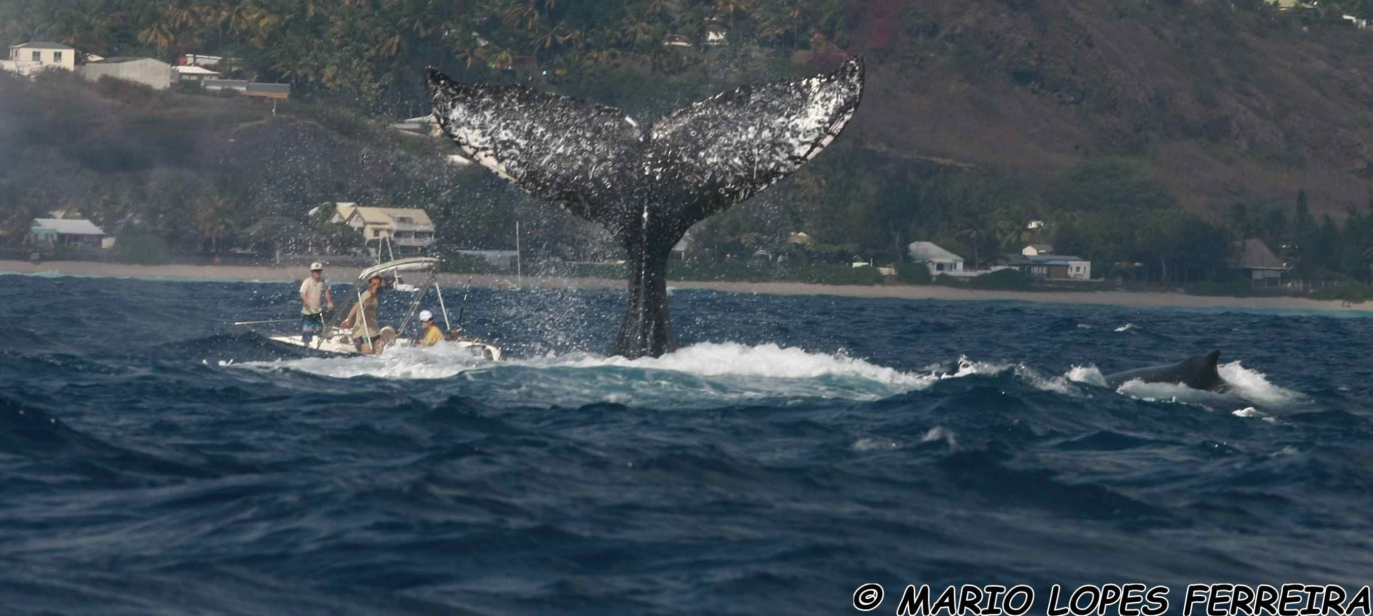 Queue d'une jeune baleine à bosses devant une petite embarcation.